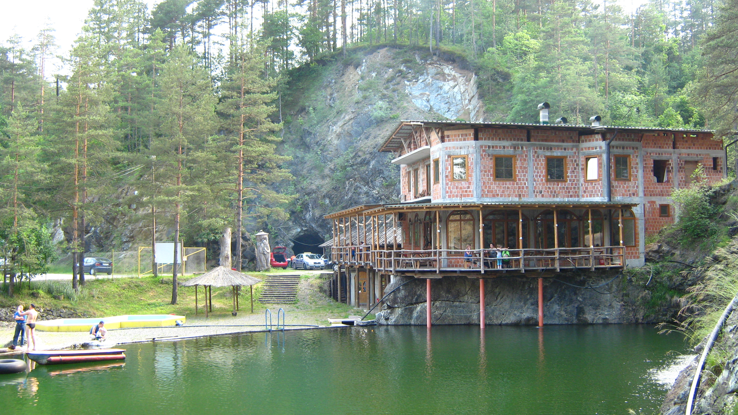 Орлово језеро, на планини Озрен, у Српској Licensing